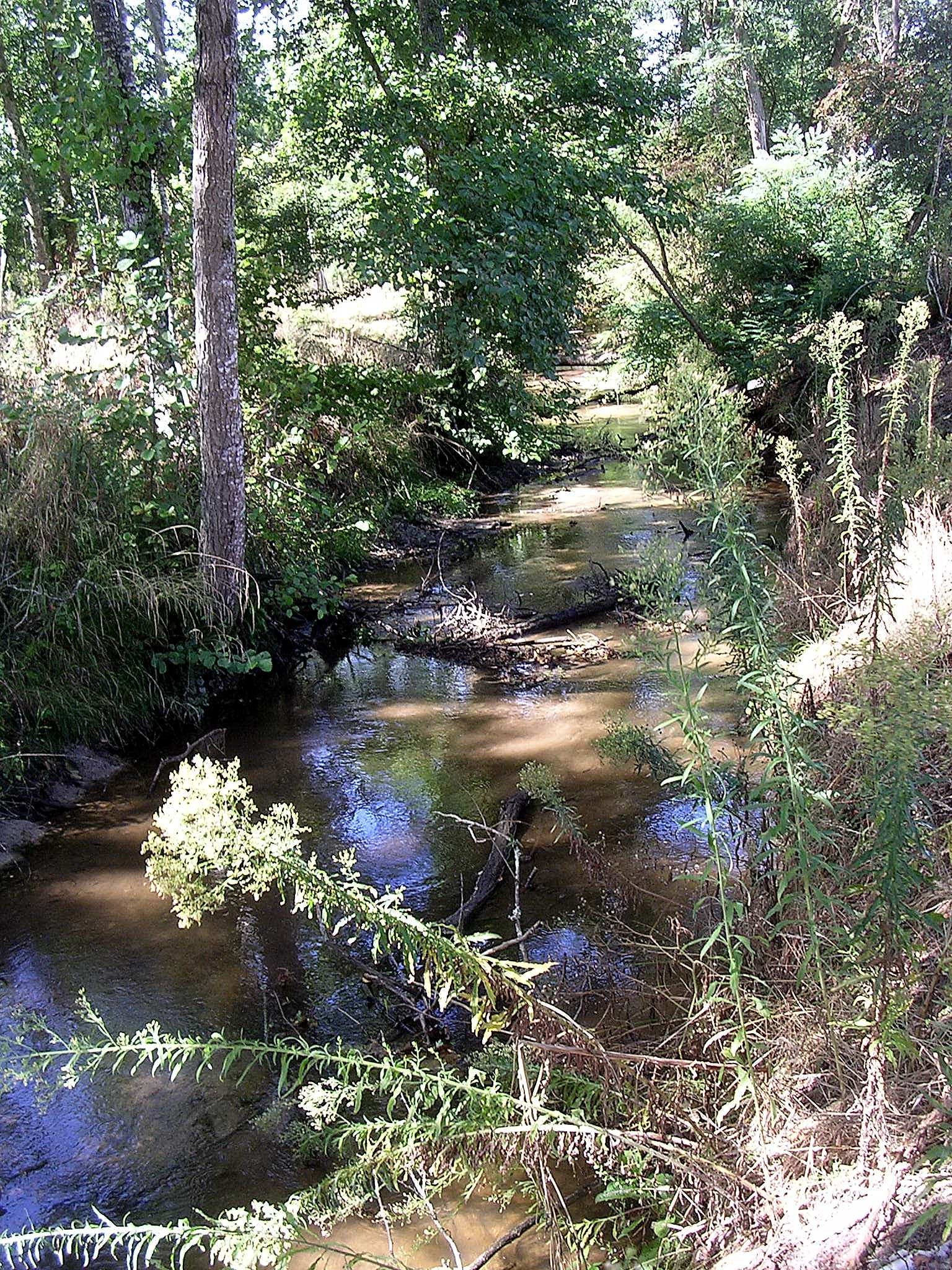 Ruisseau Saint-Jean, traversant la commume de Benquet, dans le département français des Landes